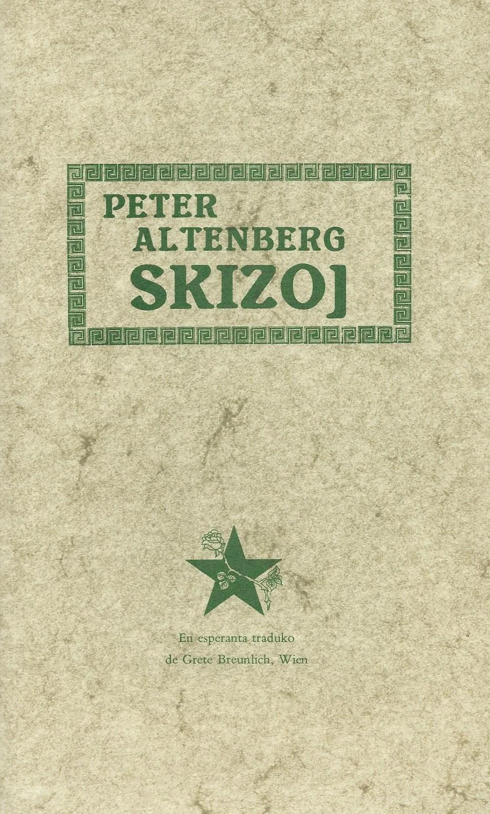 librokovrilo de libro "Skizoj", 1982